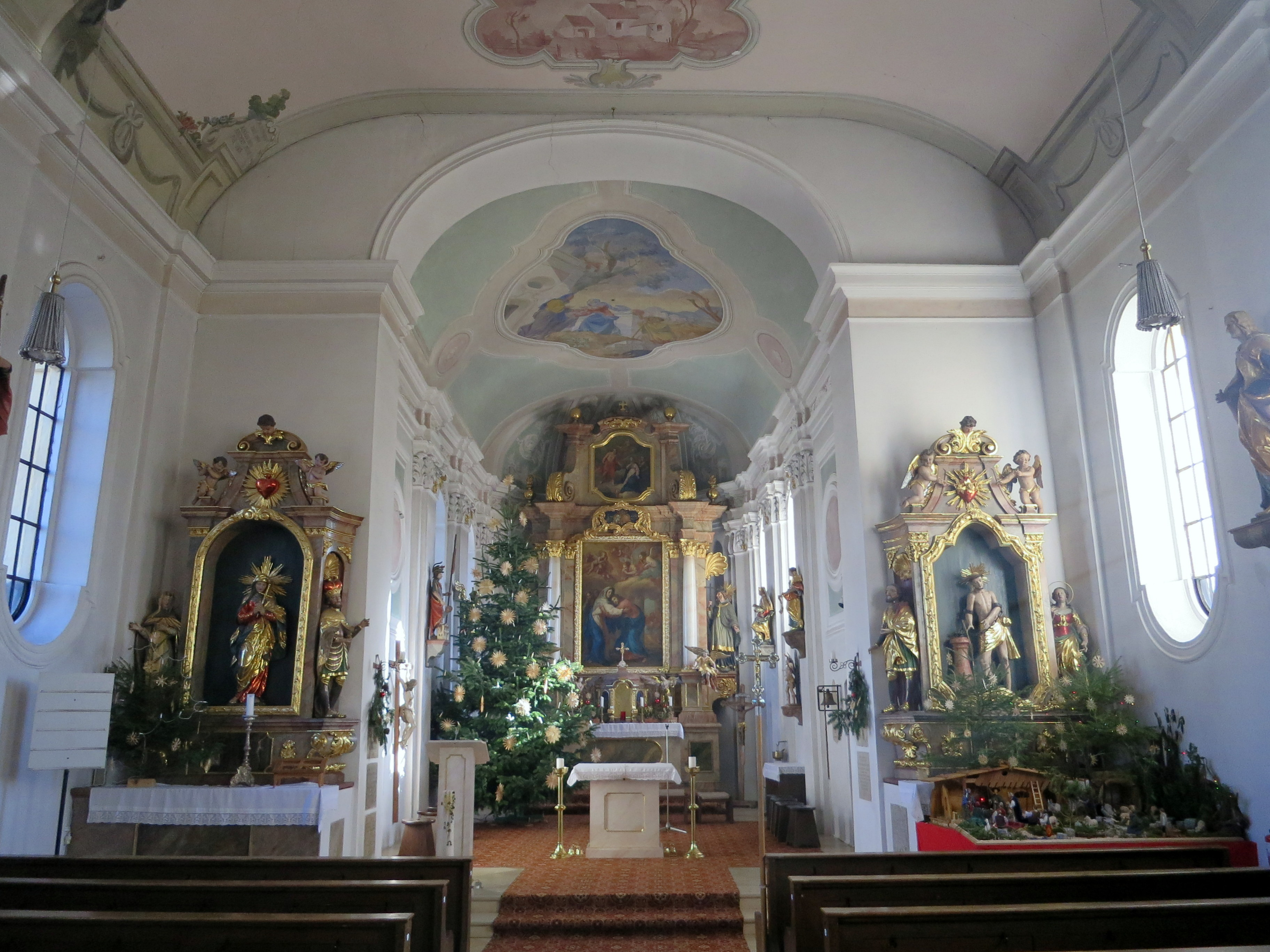 Altäre